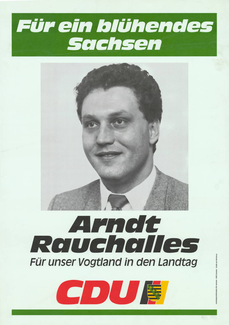 Für ein blühendes Sachsen Arndt Rauchalles Für unser Vogtland in den Landtag CDU Abbildung: Porträtfoto Plakatart: Kandidaten-/Personenplakat mit Porträt Auftraggeber: Landesgeschäftsstelle CDU Sachsen, Dresden Objekt-Signatur: 10-035 : 6 Bestand: Landtagswahlplakate Sachsen (10-035) GliederungBestand10-18: Landtagswahlplakate Sachsen (10-035) » CDU Lizenz: KAS/ACDP 10-035 : 6 CC-BY-SA 3.0 DE